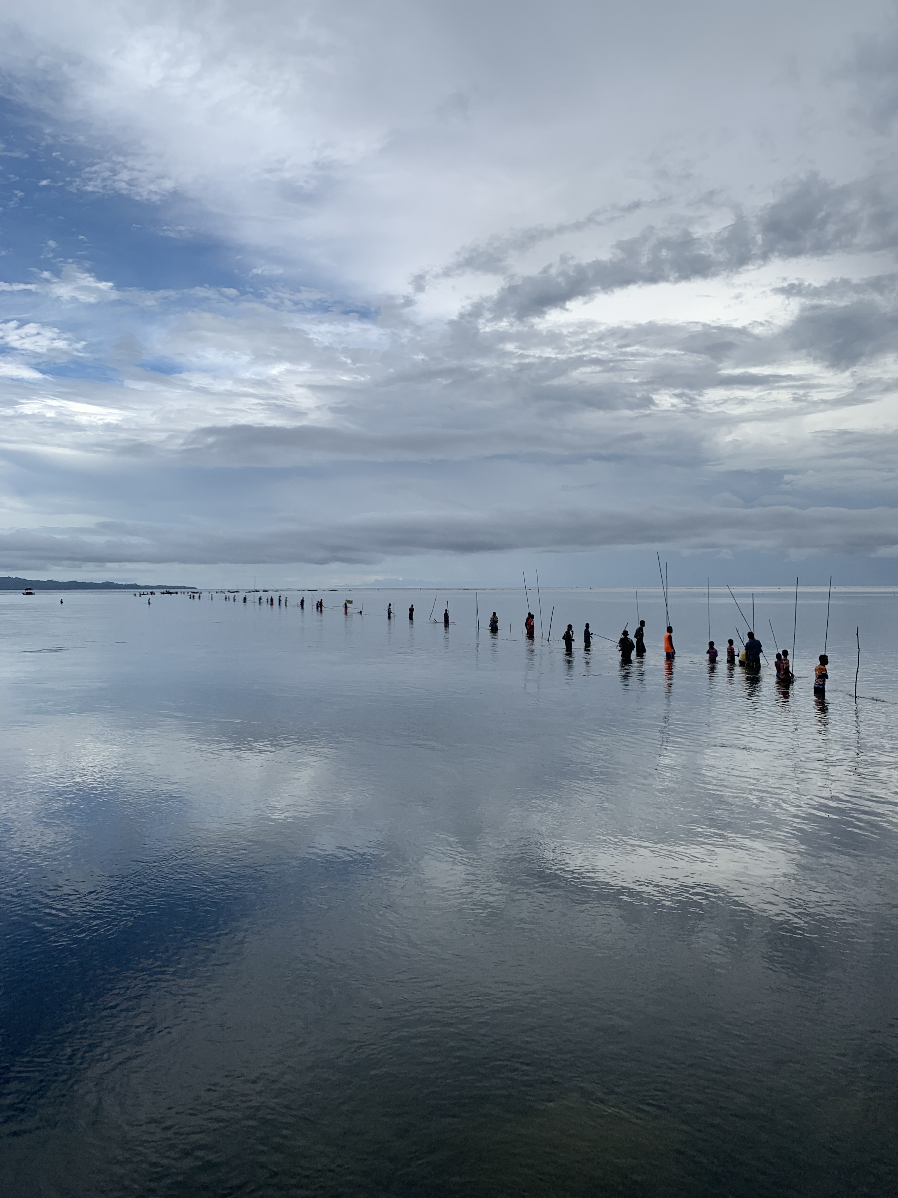 Masyarakat berbaris hingga tengah laut untuk menangkap ikan di Munara Wampasi Wandos